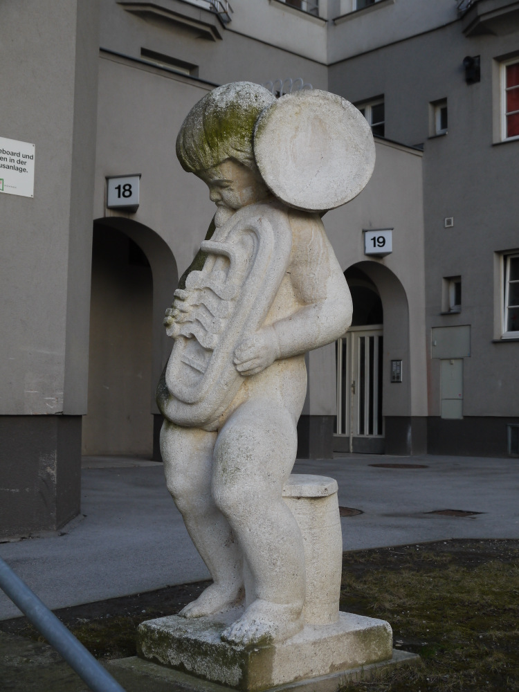 Fuchsenfeldhof "2 musizierende Putti" Josef Riedl